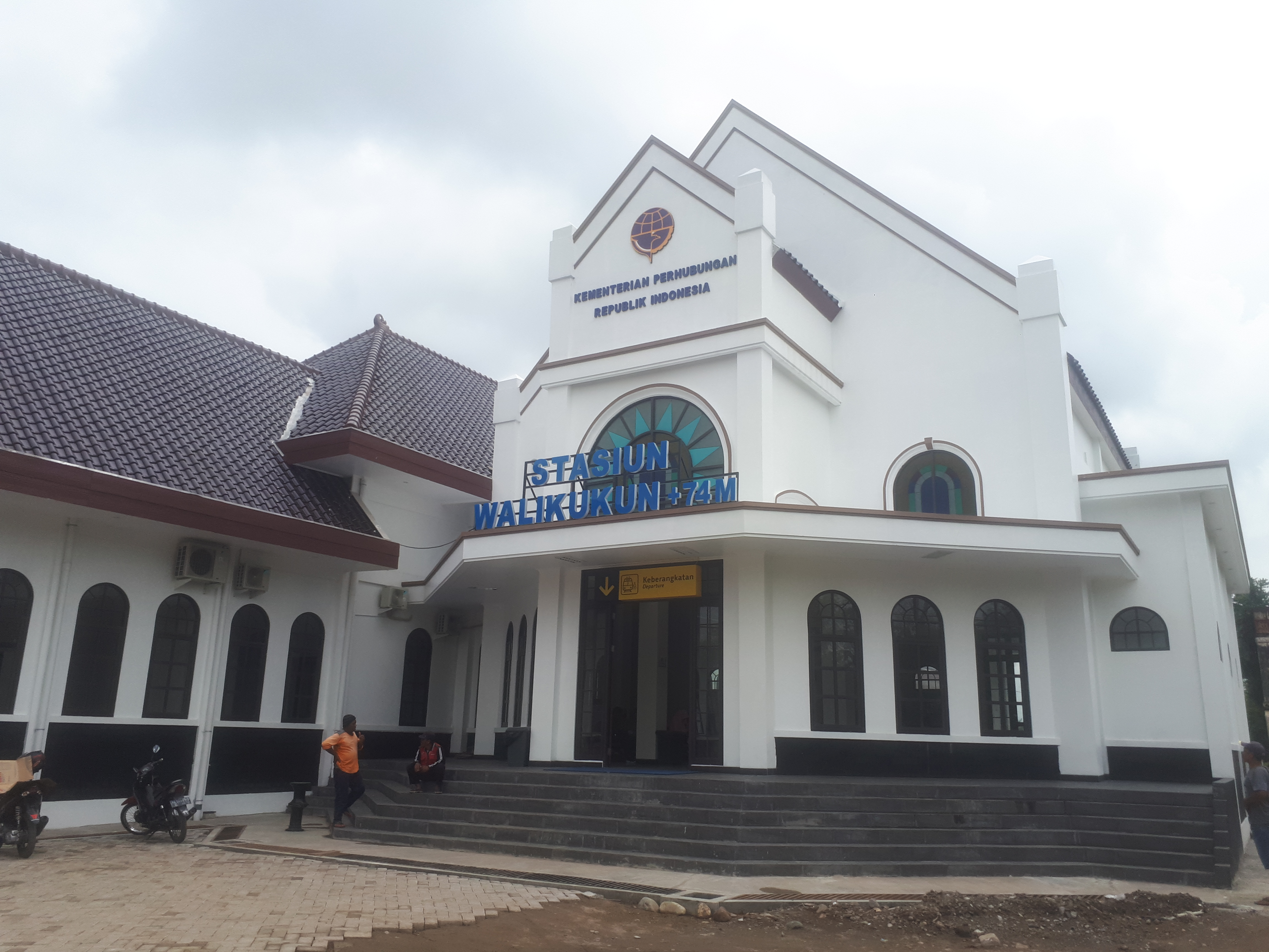 Bangunan baru Stasiun Walikukun yang mulai beroperasi pada 30 November 2019 bersamaan dengan aktivasi rel jalur ganda Geneng - Kedungbanteng.